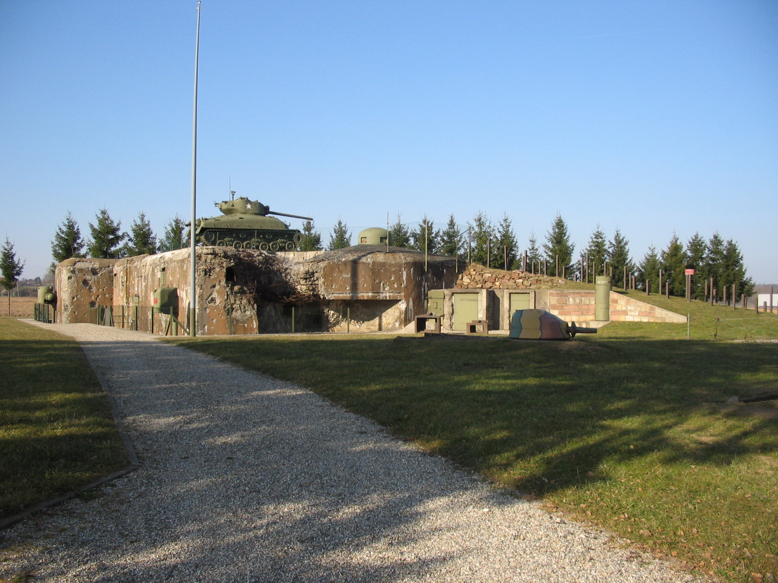 Casemate Esch, élément de la ligne Maginot. Photo prise par Denis Helfer sous licence GFDL